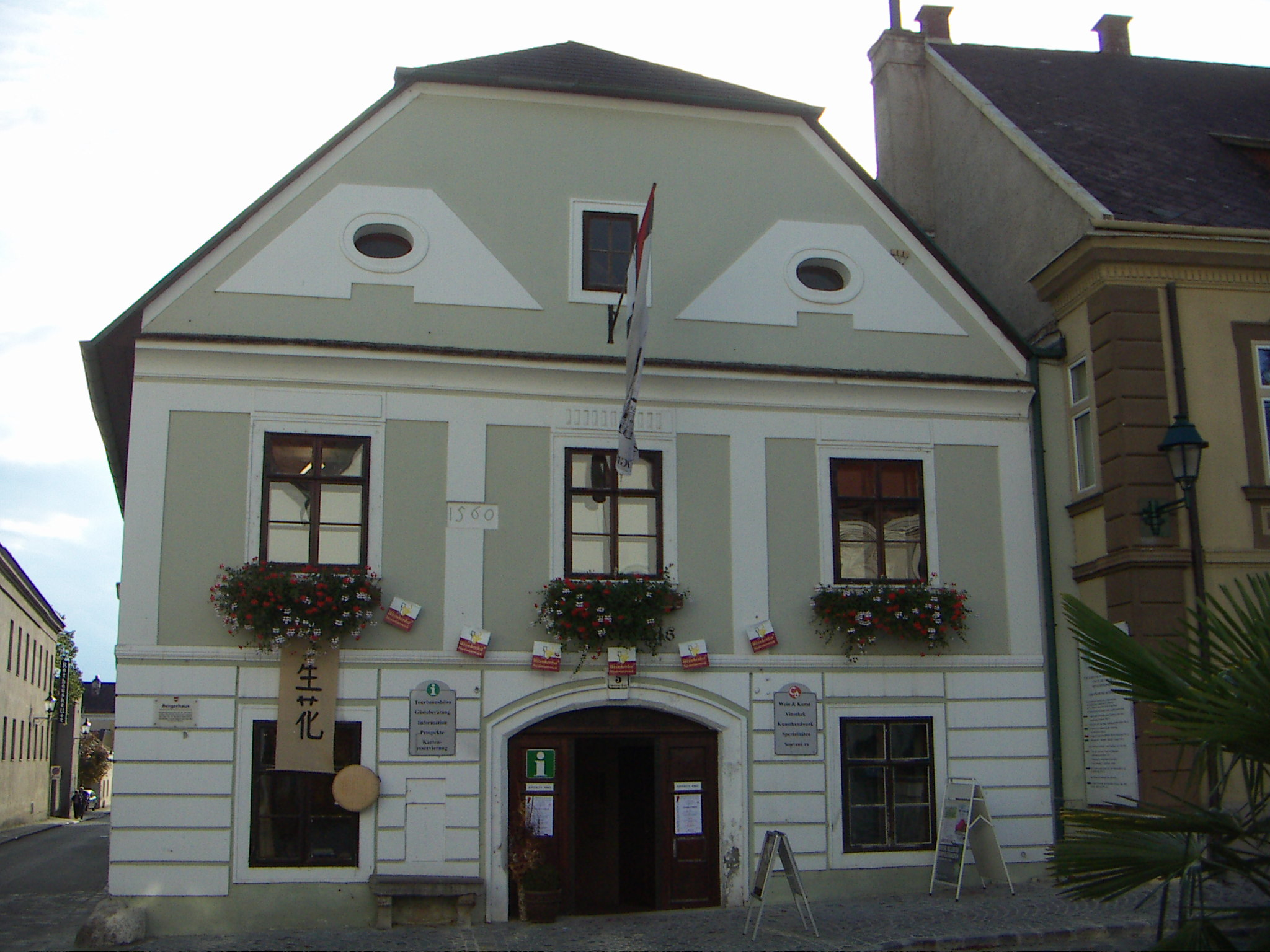 Bergerhaus, Schrannenplatz 5, in Gumpoldskirchen